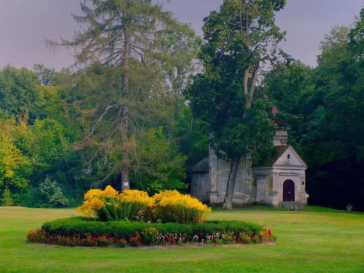 Дубае. Капліца